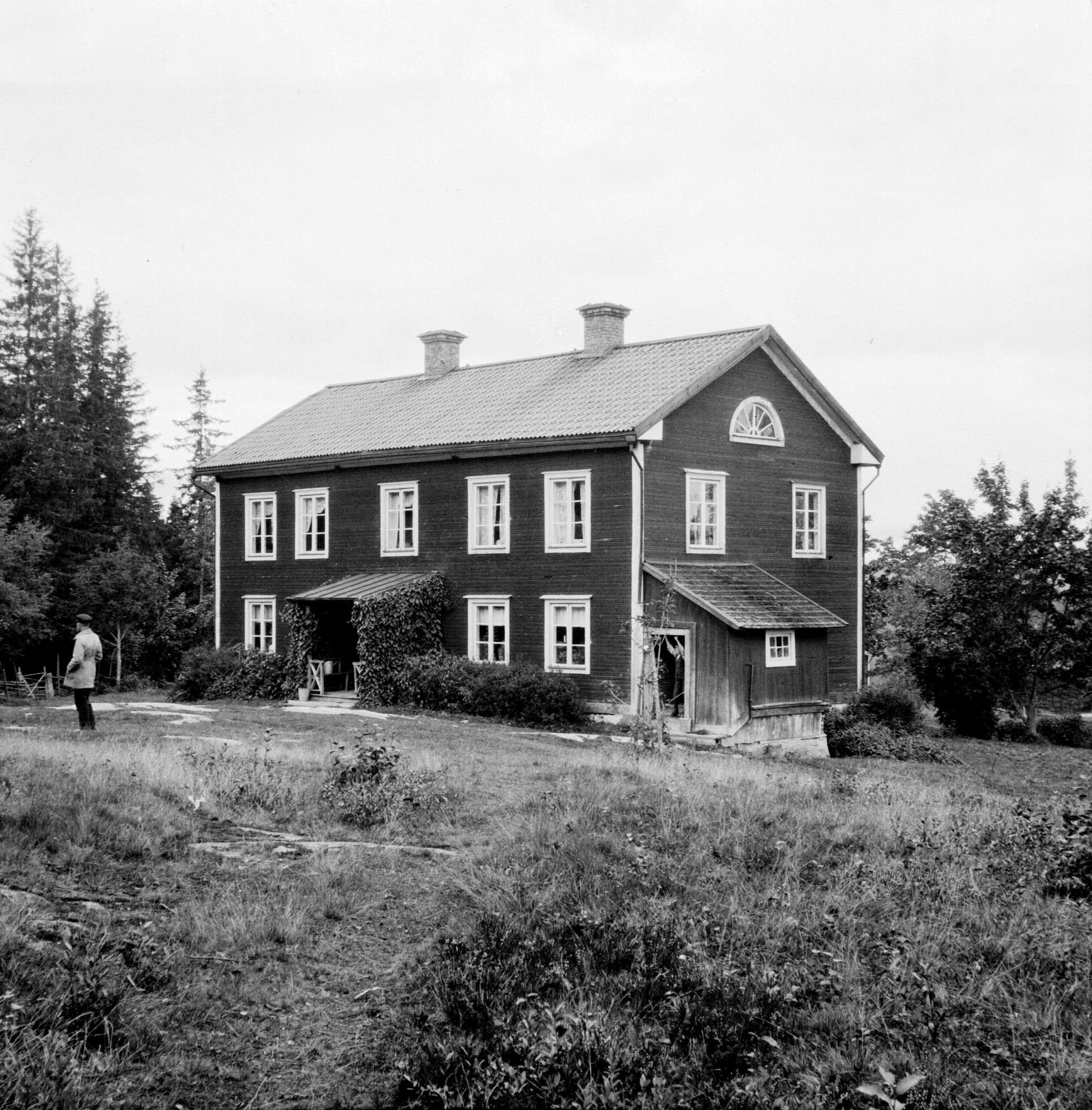 F.d. gästgivargården i Hällsjön, Ludvika socken.